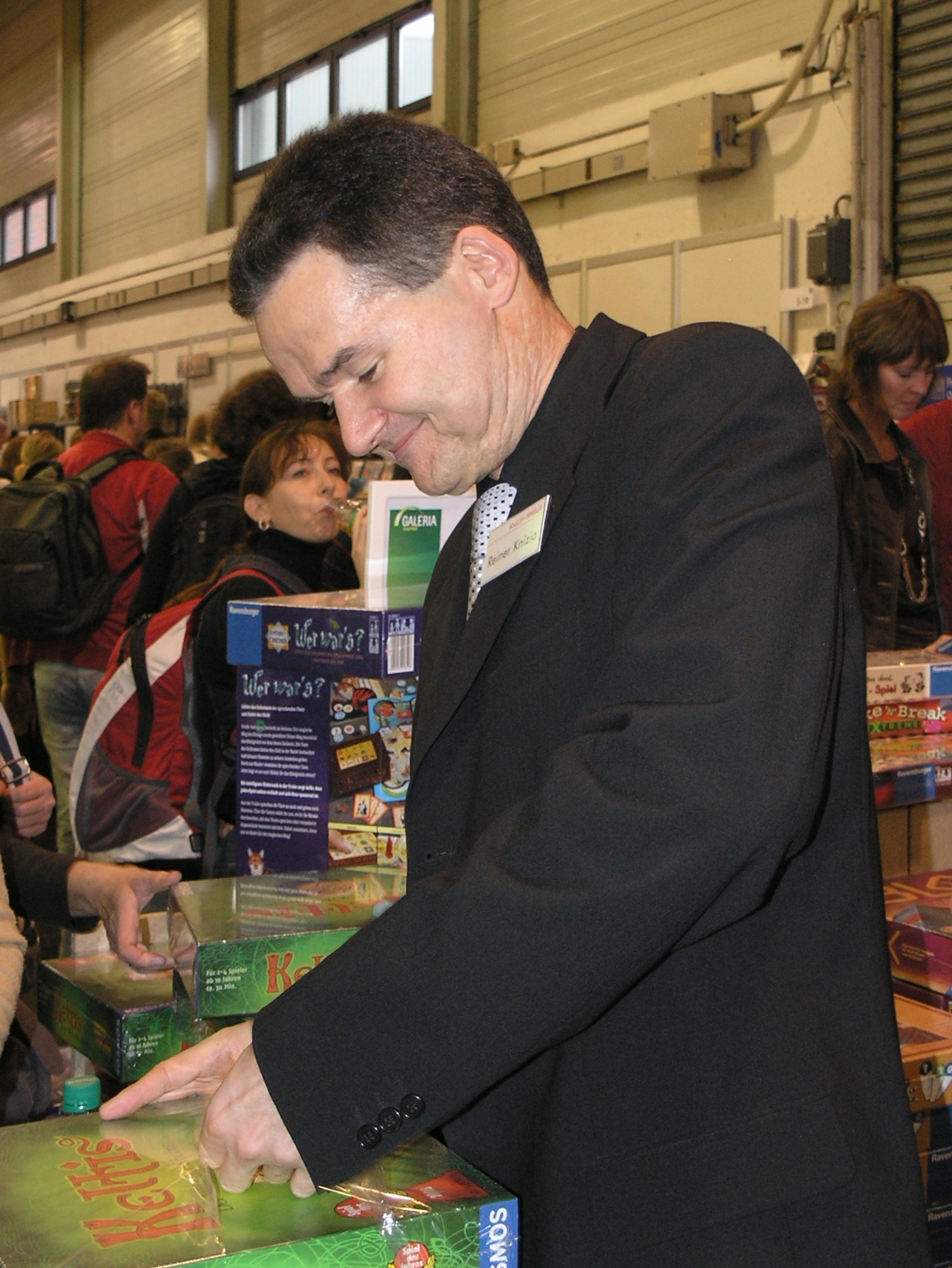 Internationalen Spieltage SPIEL 2008